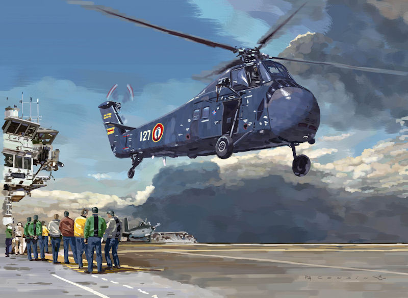 Hélicoptère HSS de la flotille 33F au décollage du porte-avions Clémenceau en janvier 1969.